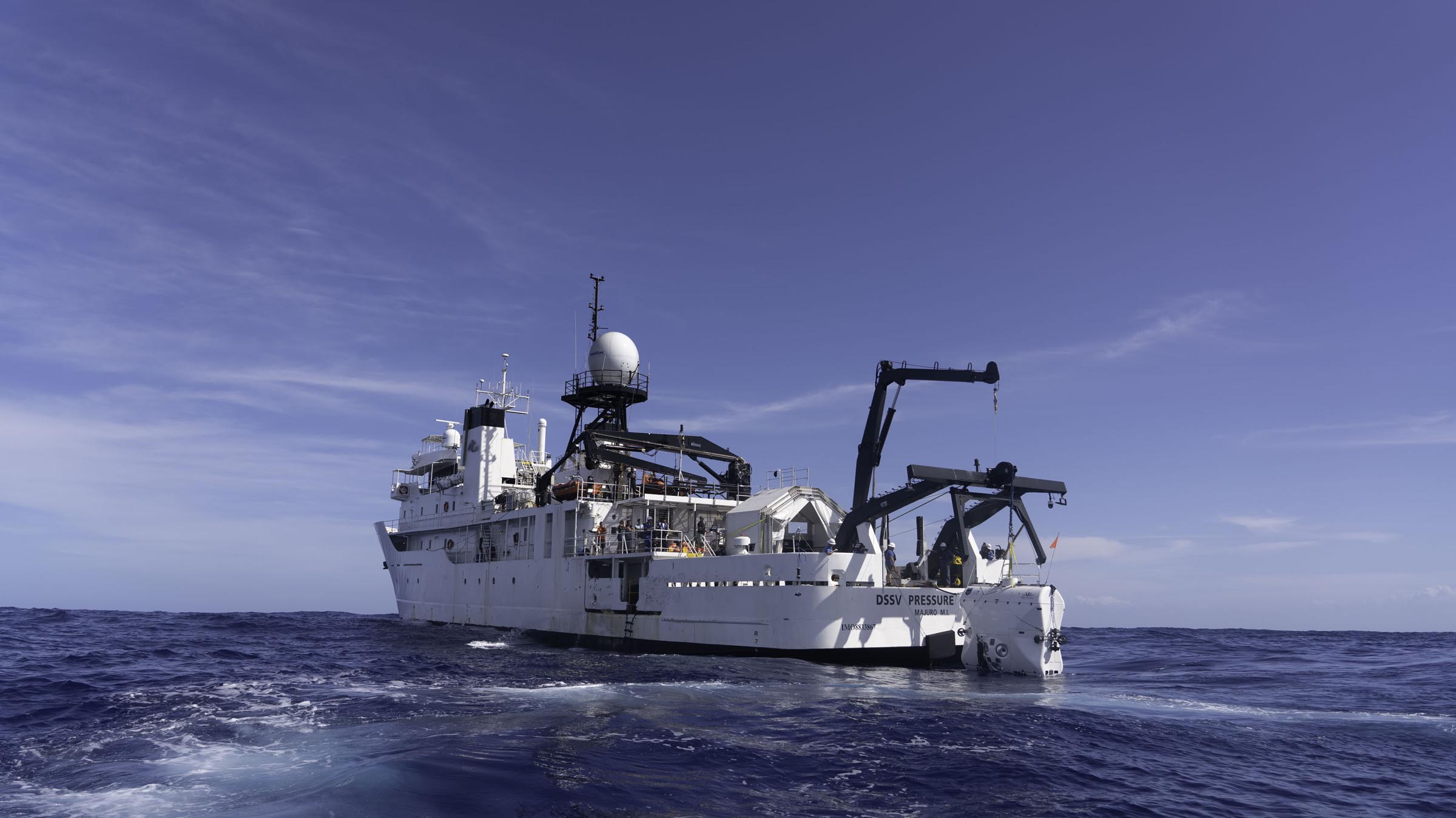 Dieses Bild wurde im Rahmen der Tauchgänge im Atlantischen Ozean aufgenommen.